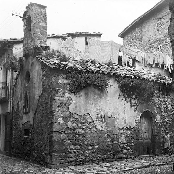 Capella romànica de Sant Joan de les Abadesses. Josep Salvany i Blanch (1916)